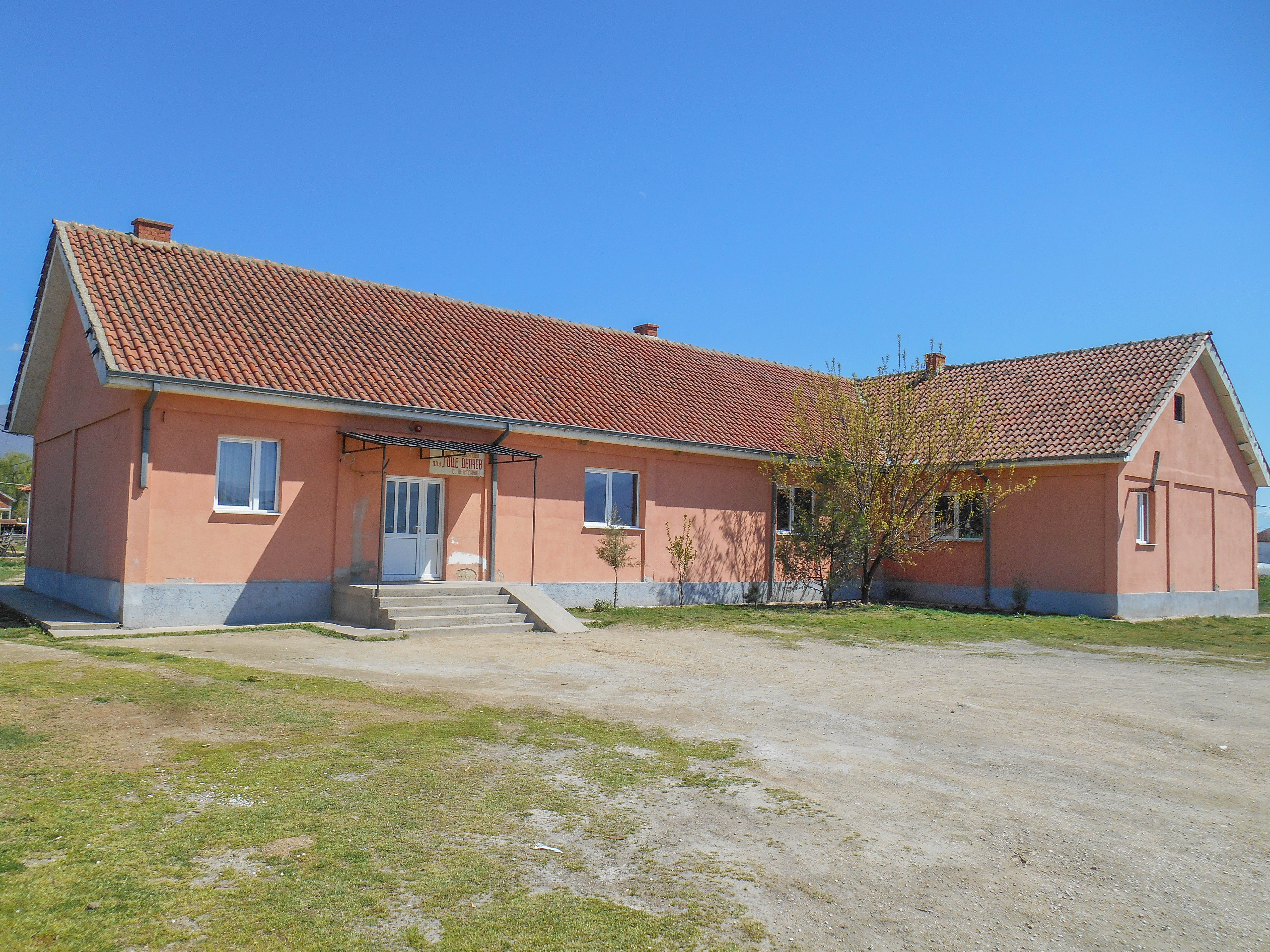 Основно Училиште „Гоце Делчев“ - Петралинци